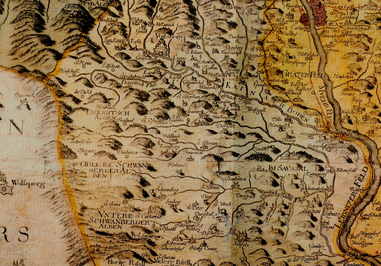 Weststeiermark 2. Hälfte des 17. Jahrhunderts.